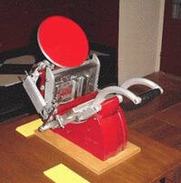 Adana platen press